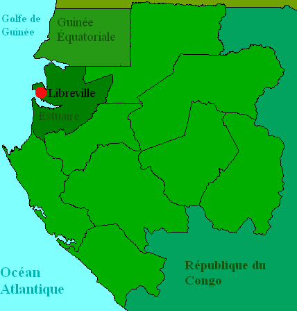 Localisation de Libreville au Gabon